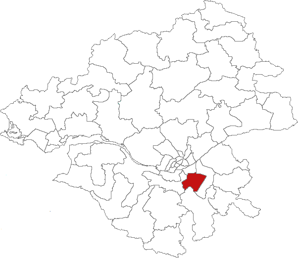 Carte de localisation du canton de Vertou (France, Loire-Atlantique)